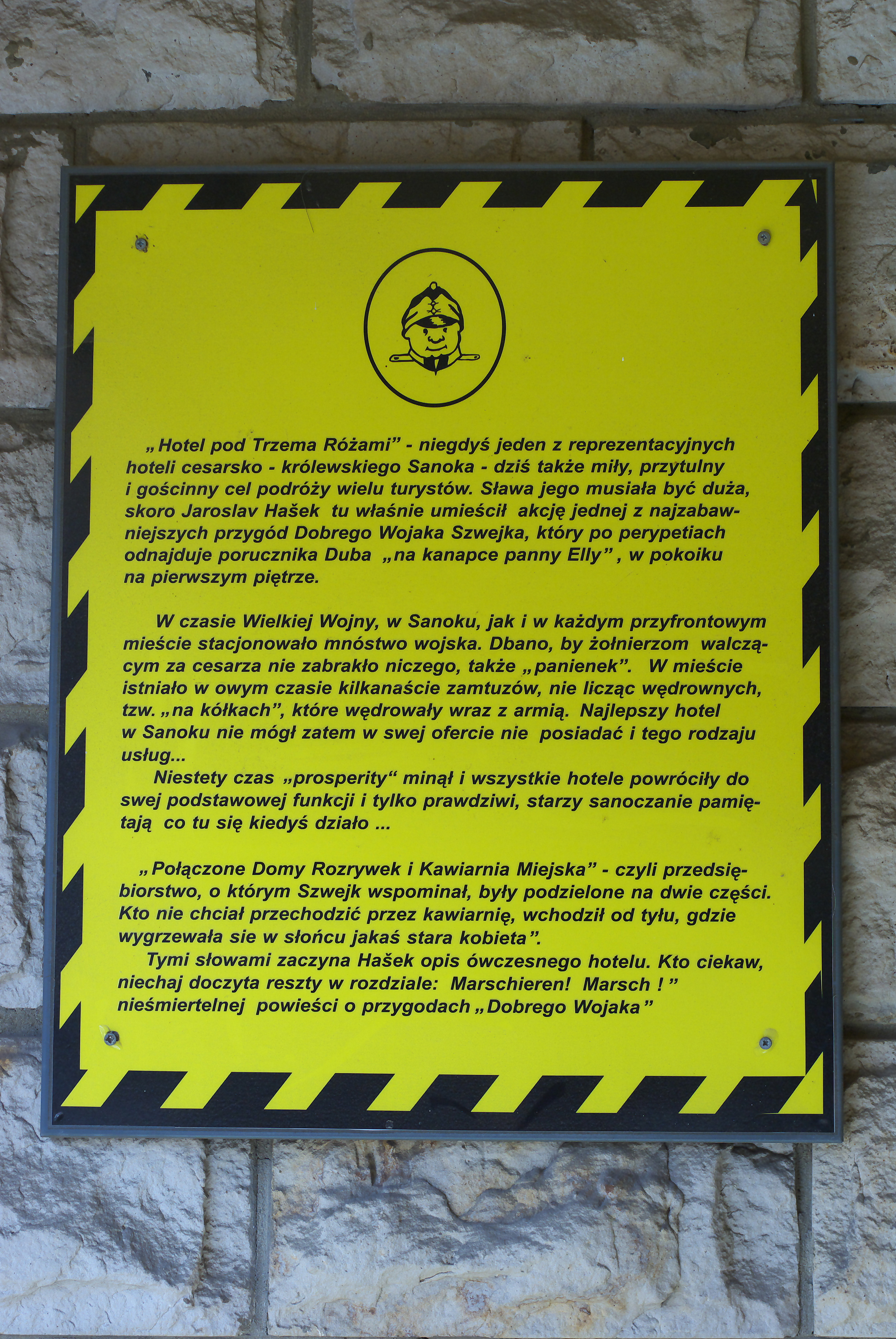 Tablica informacyjne na Szlaku śladami dobrego wojaka Szwejka w Sanoku - Hotel pod 3 Różami